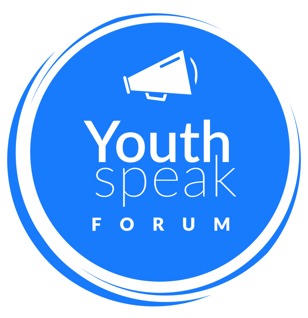 Logo of Youth Speak Forum